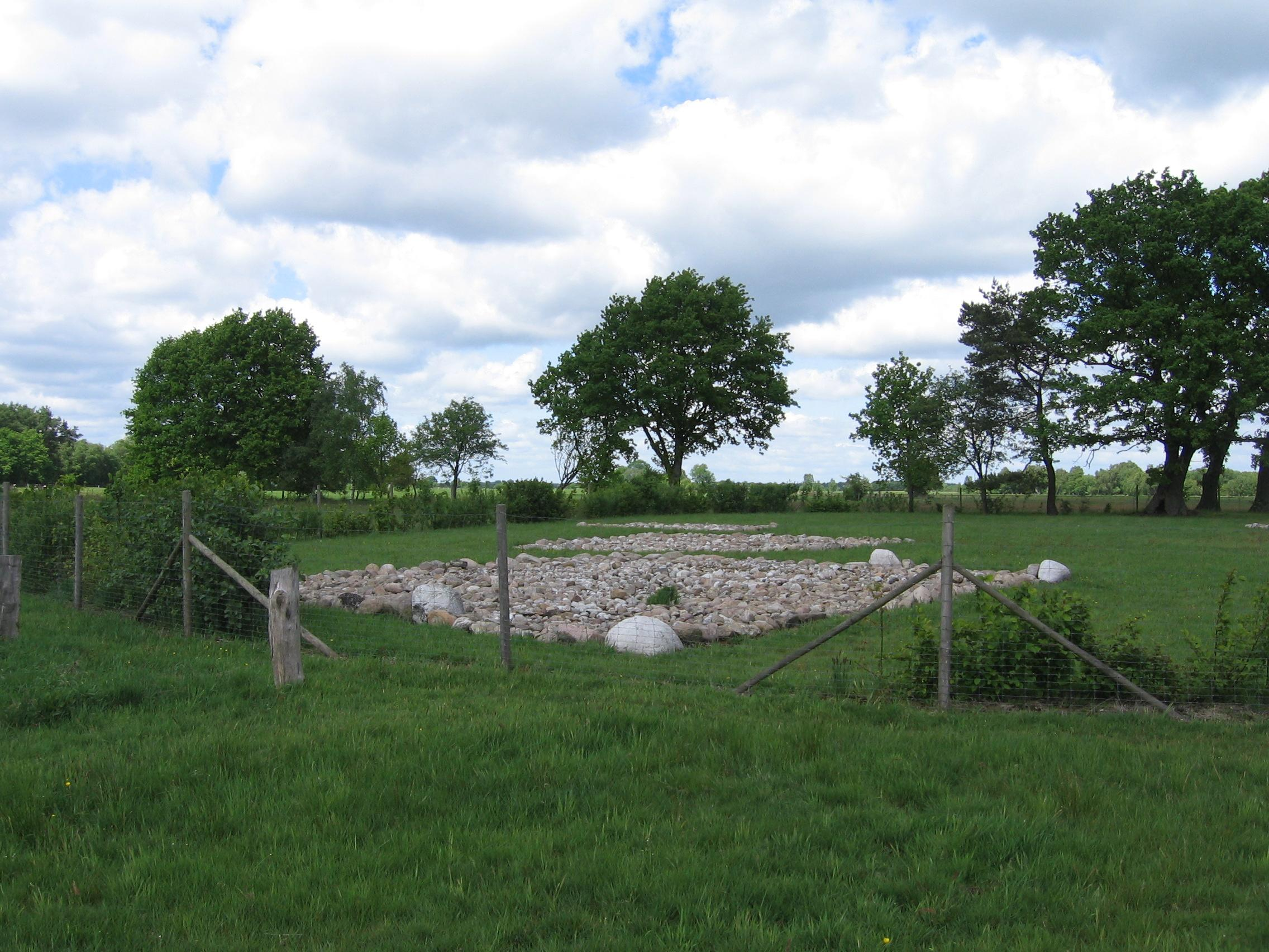 Die Burg im Dannensee vom Süden aus gesehen